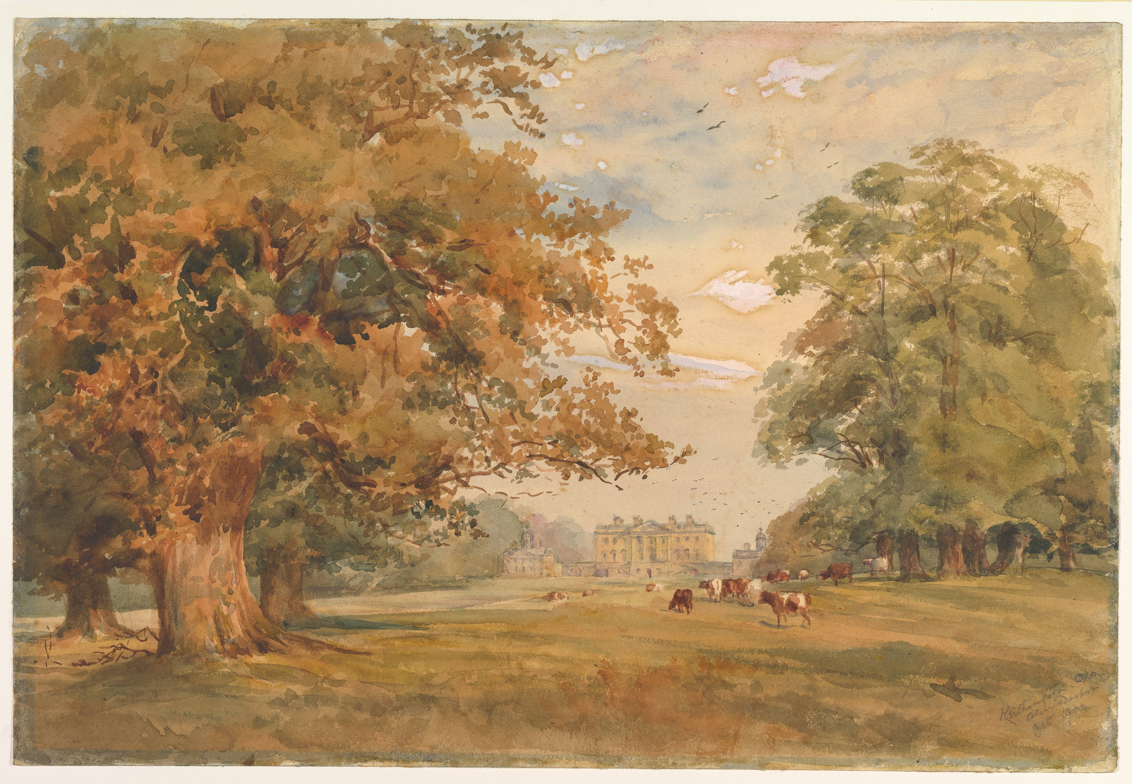 Drawing; Drawings